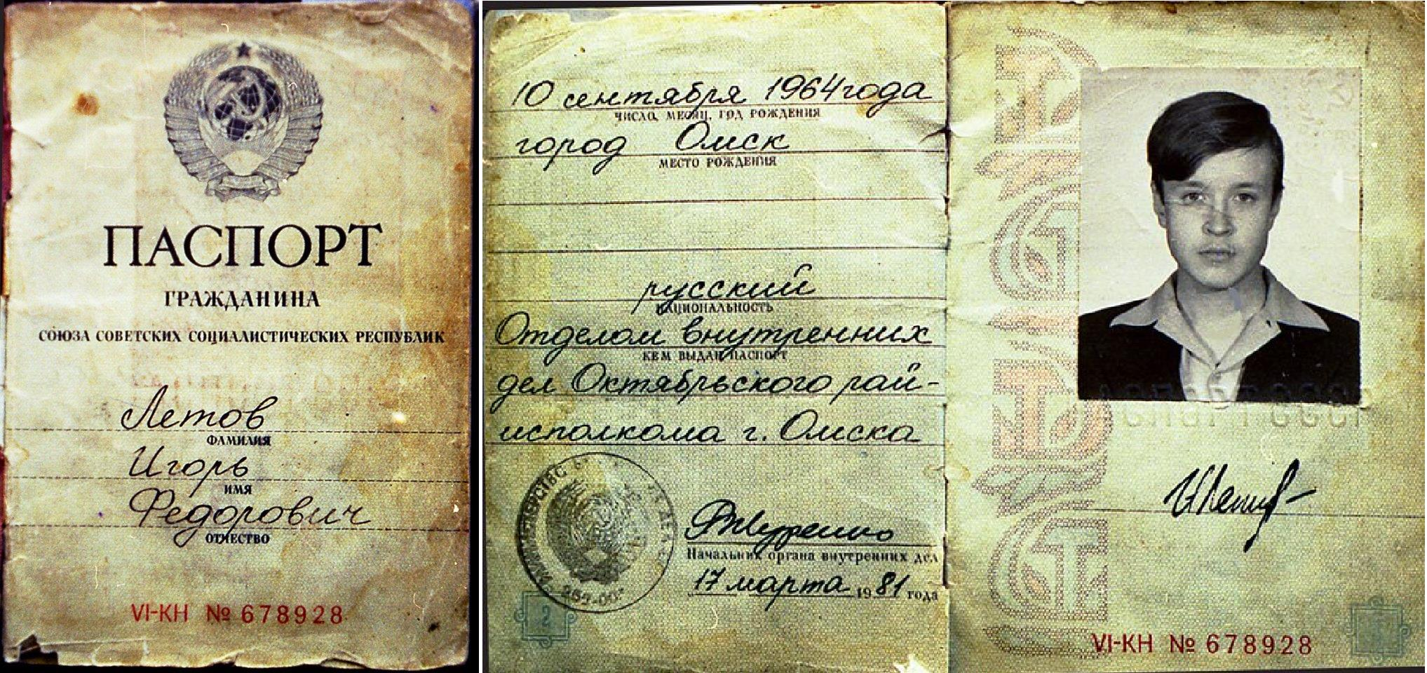 Летов Игорь Федорович, паспорт